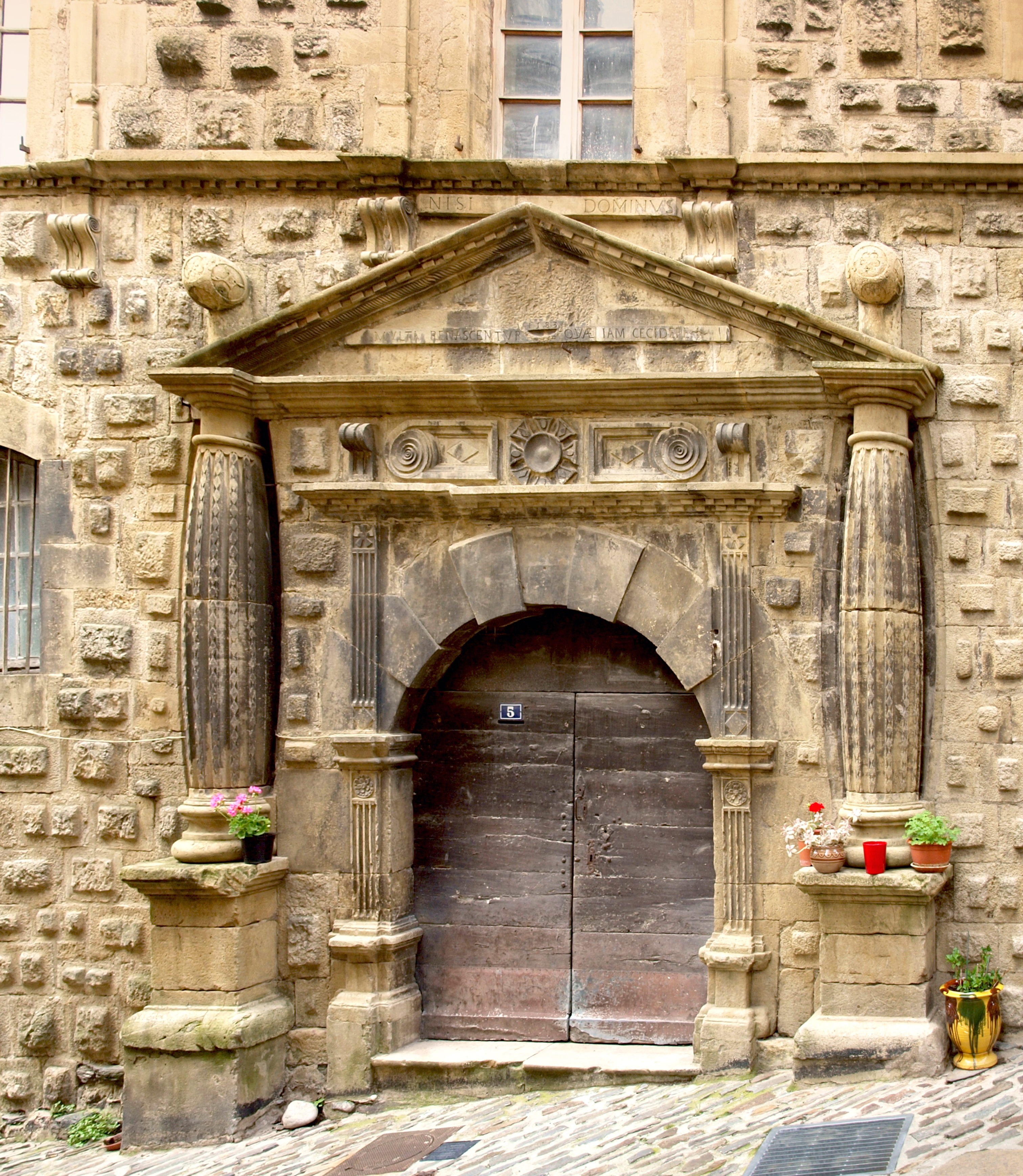 Florac (Lozère) - Porte des Templiers - Ancien couvent